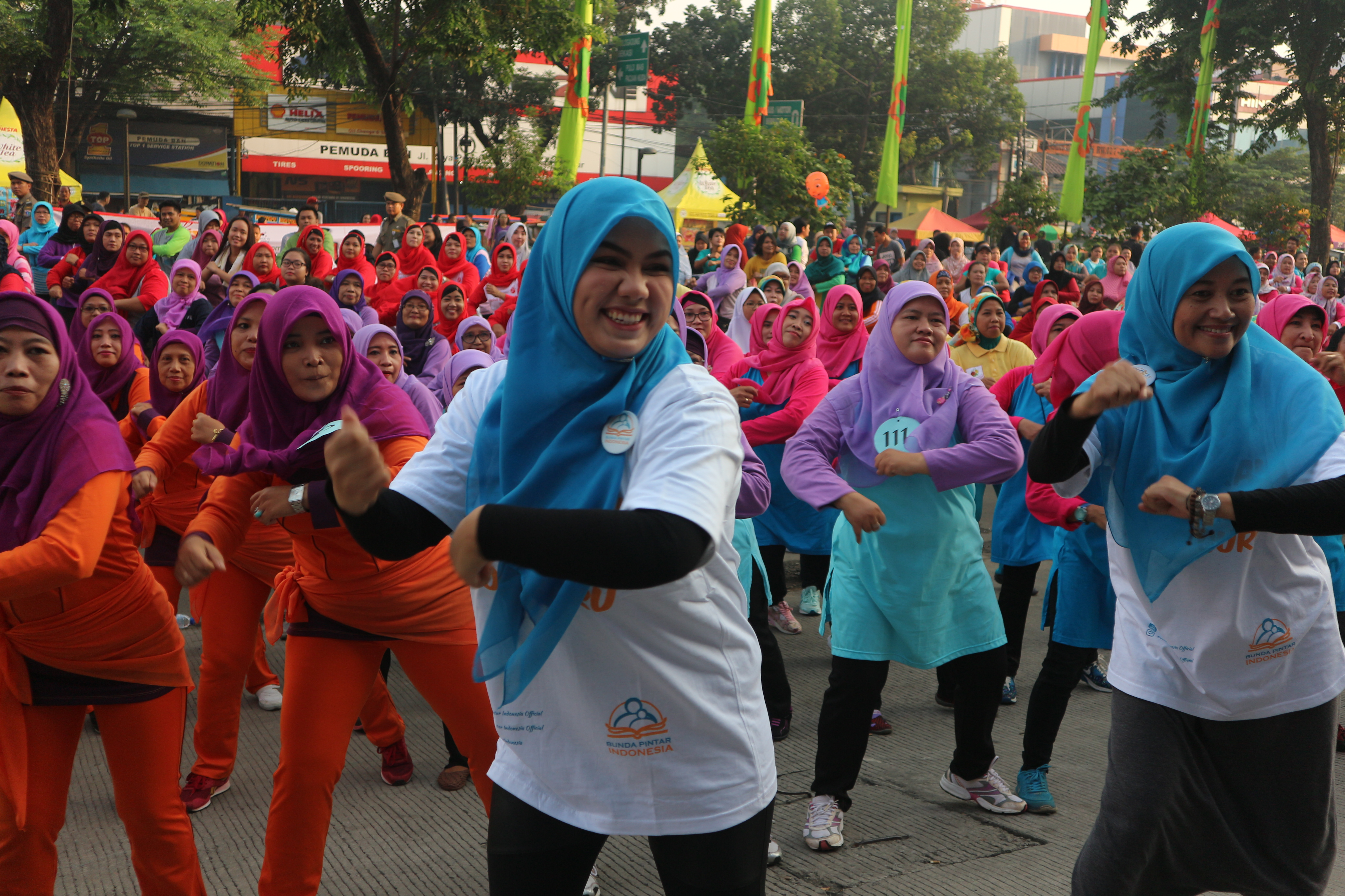 Bunda Zita Anjani, saat melakukan kegiatan senam bersama dengan 1000 Guru PAUD di CFD Jakarta Timur, 2016